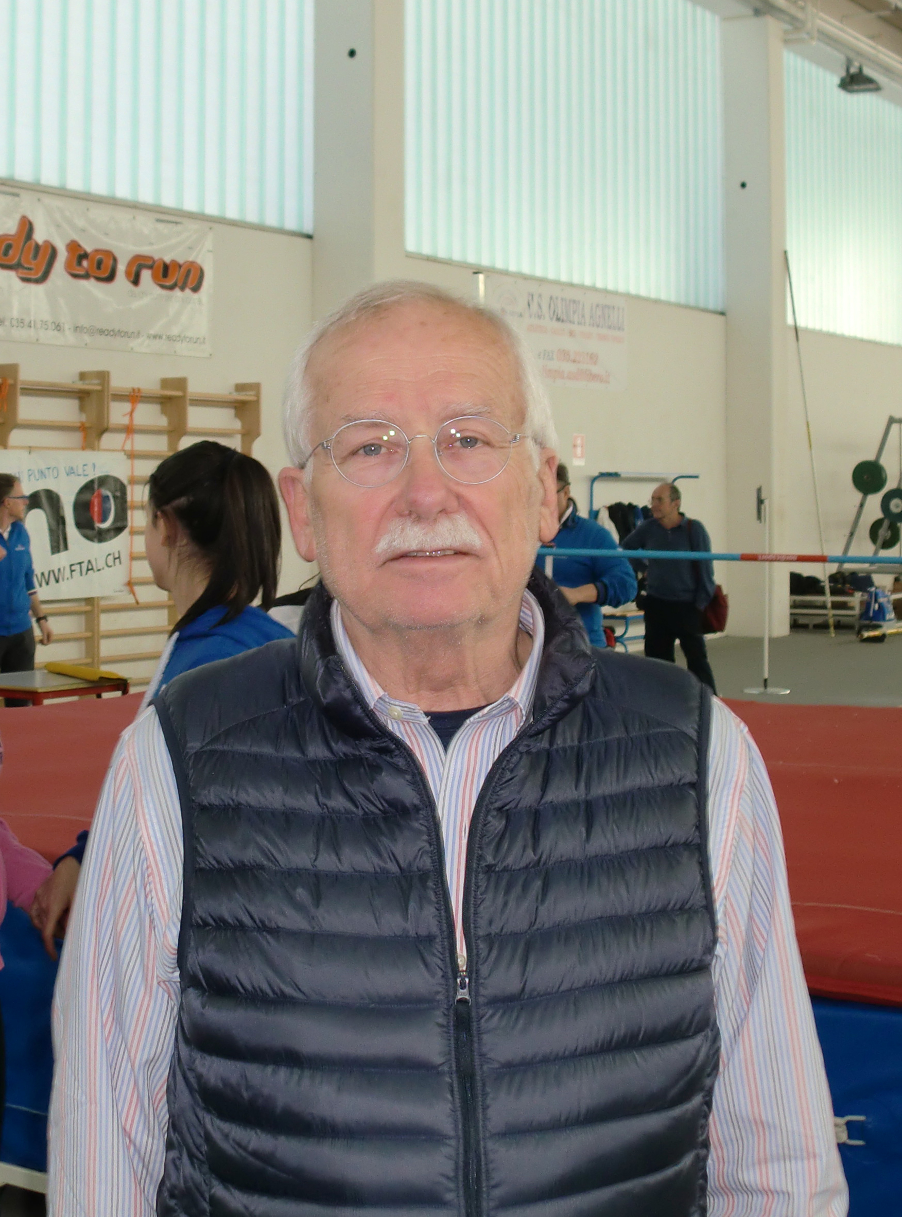 L'ostacolista olimpionico Eddy Ottoz fotografato a Bergamo in occasione di una gara di atletica leggera.